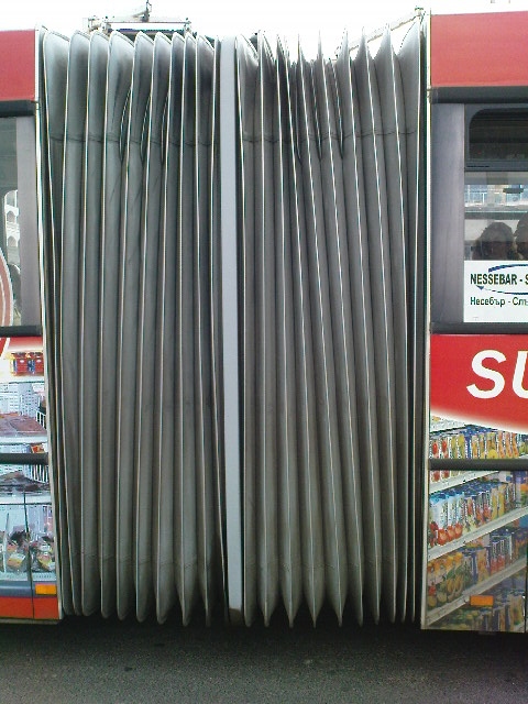 автобус Mercedes O 405G